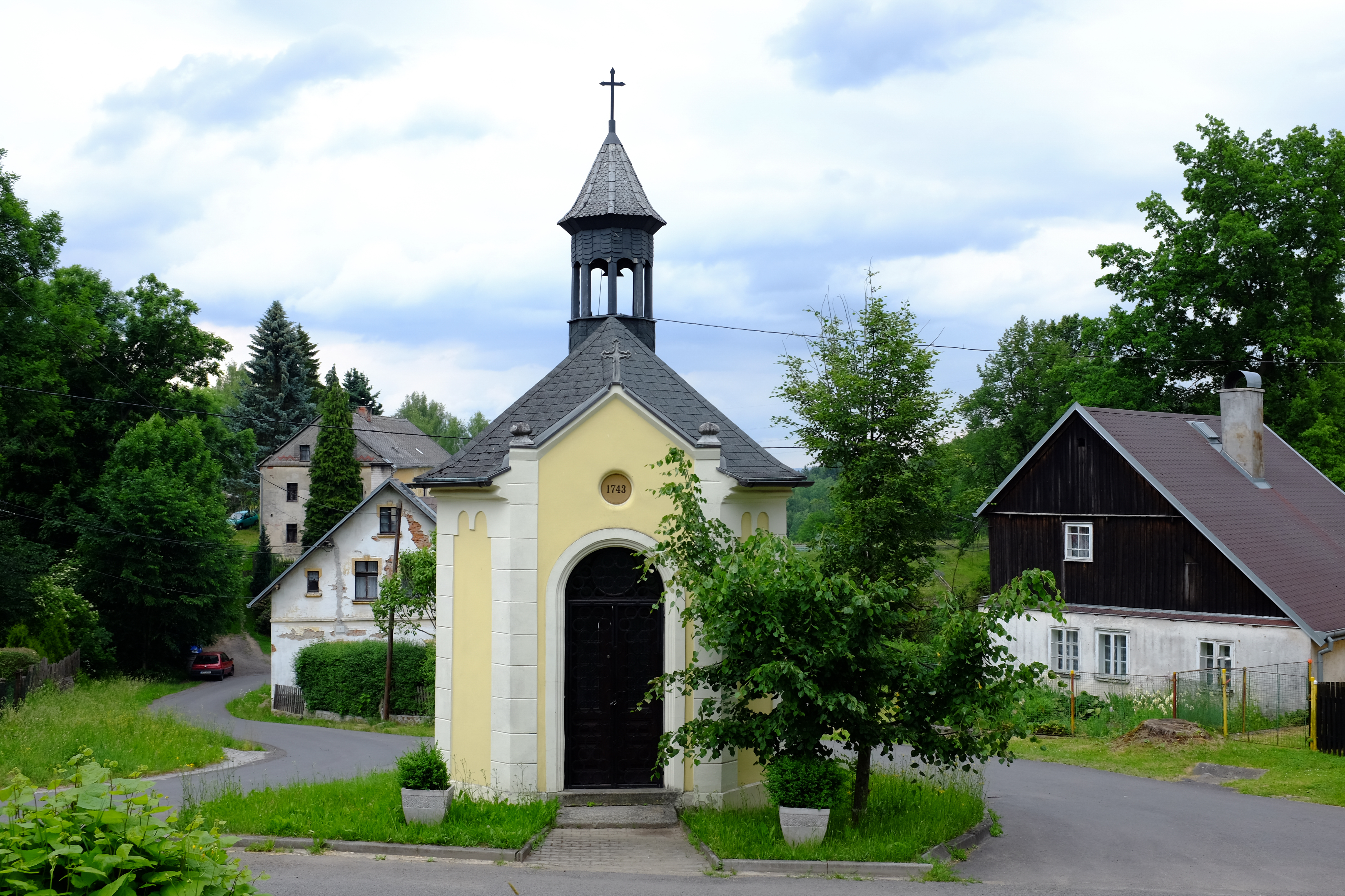 Kaple svatého Jana Nepomuckého, náves, Ležnice, Horní Slavkov, Horní Slavkov.